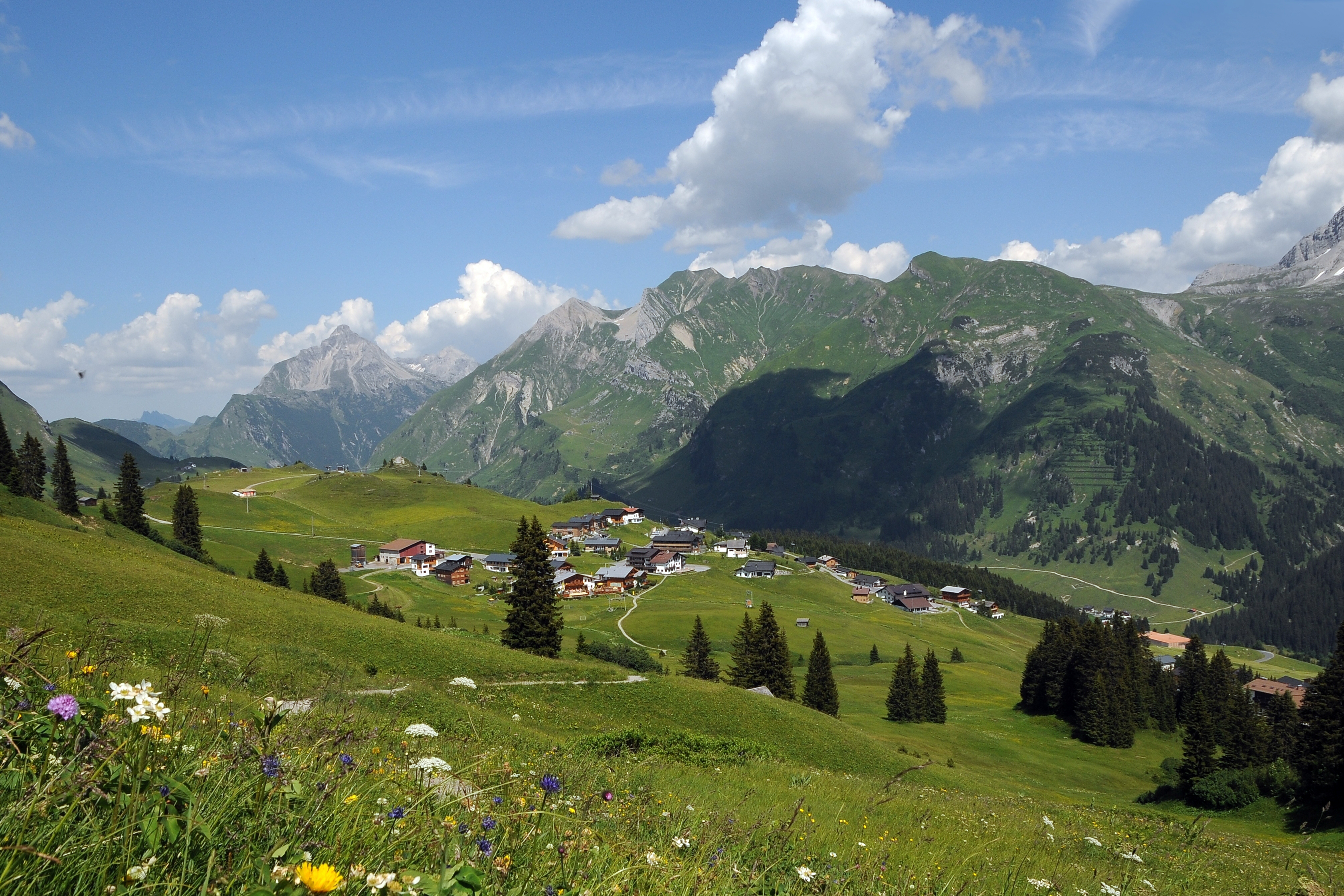 Oberlech ist ein Ortsteil von Lech (Vorarlberg).